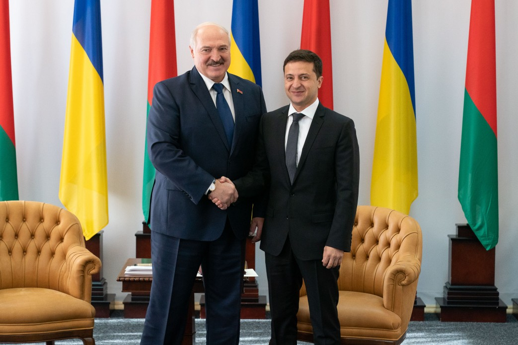 Володимир Зеленський зустрівся з Олександром Лукашенком у рамках Другого форуму регіонів України та Білорусі в Житомирі